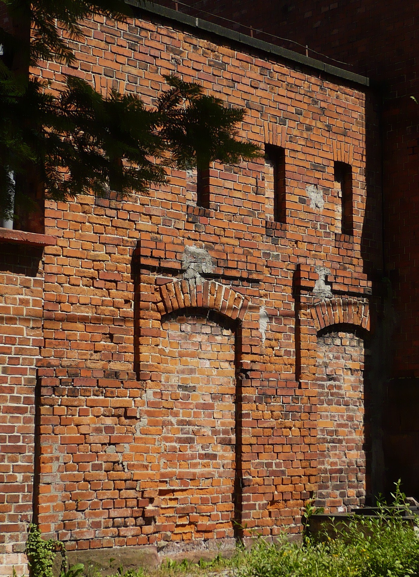 Nowa Ruda, ul. Bohaterów Getta 29 - pierwotnie sąd, obecnie komisariat policji, 1887-1889